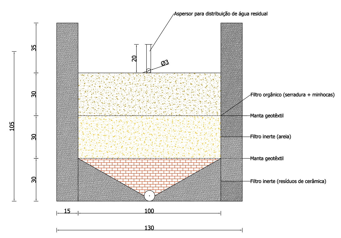 Desenho